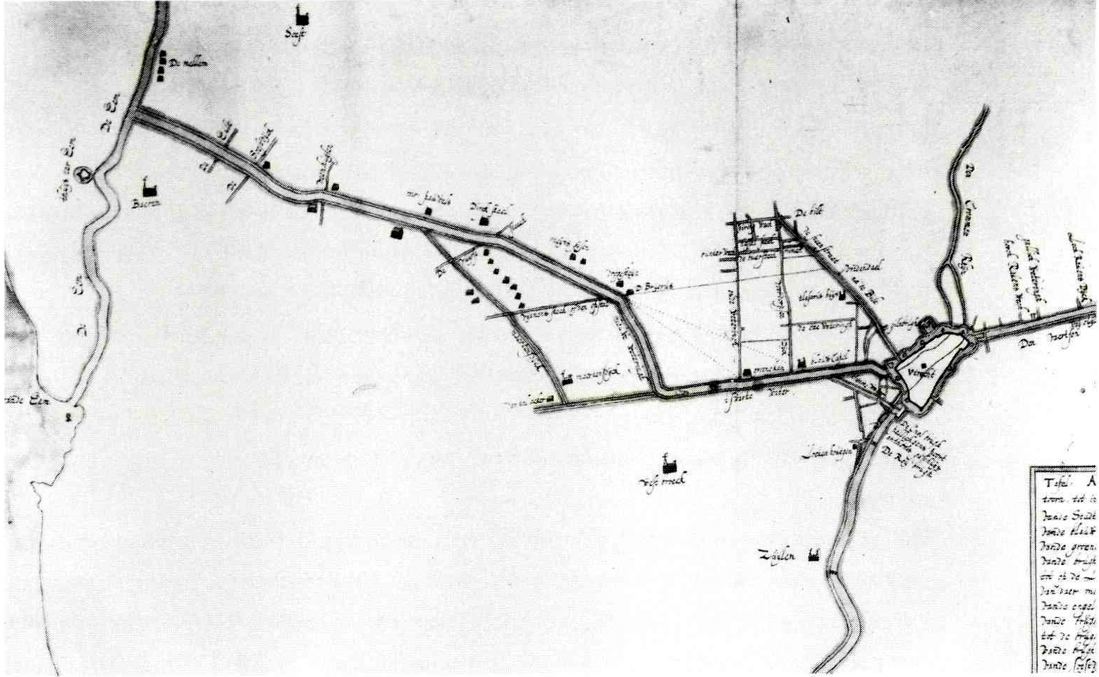 Kaart van de geprojekteerde Eemvaart uit 1640-1641 (tracé 2) (detail). Ingekleurde tekening door H. Ruysch, 1641